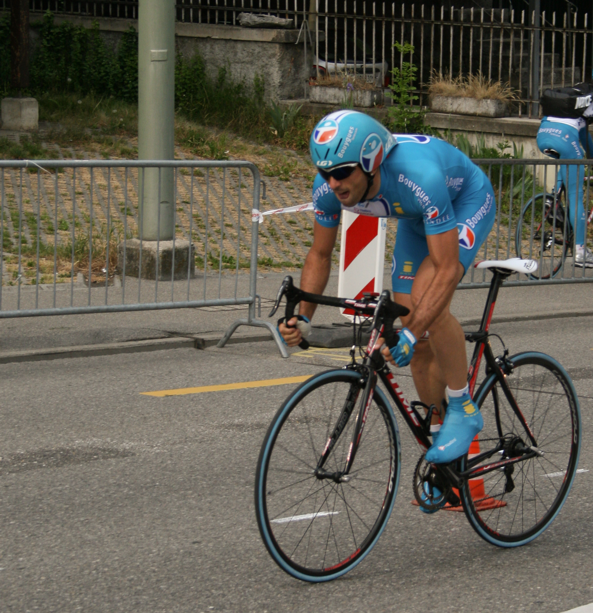 Nicolas Crosbie prologue du Tour de Romandie 2007